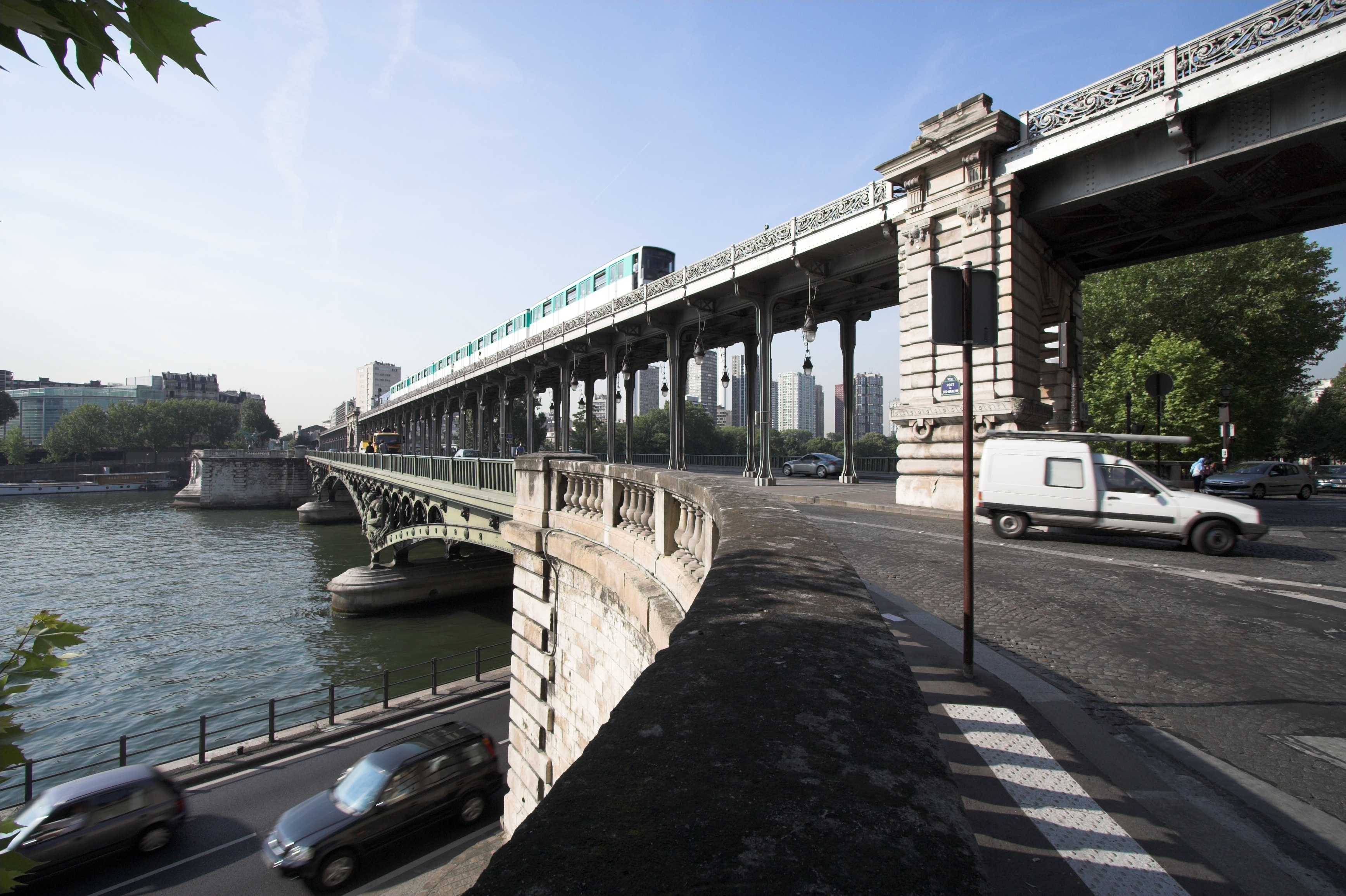 Pont de Bir-Hakeim(Paris, France)